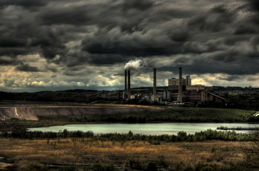 Pohled na elektrárnu Tisová od pokusné plochy Silvestr. HDR fotografie